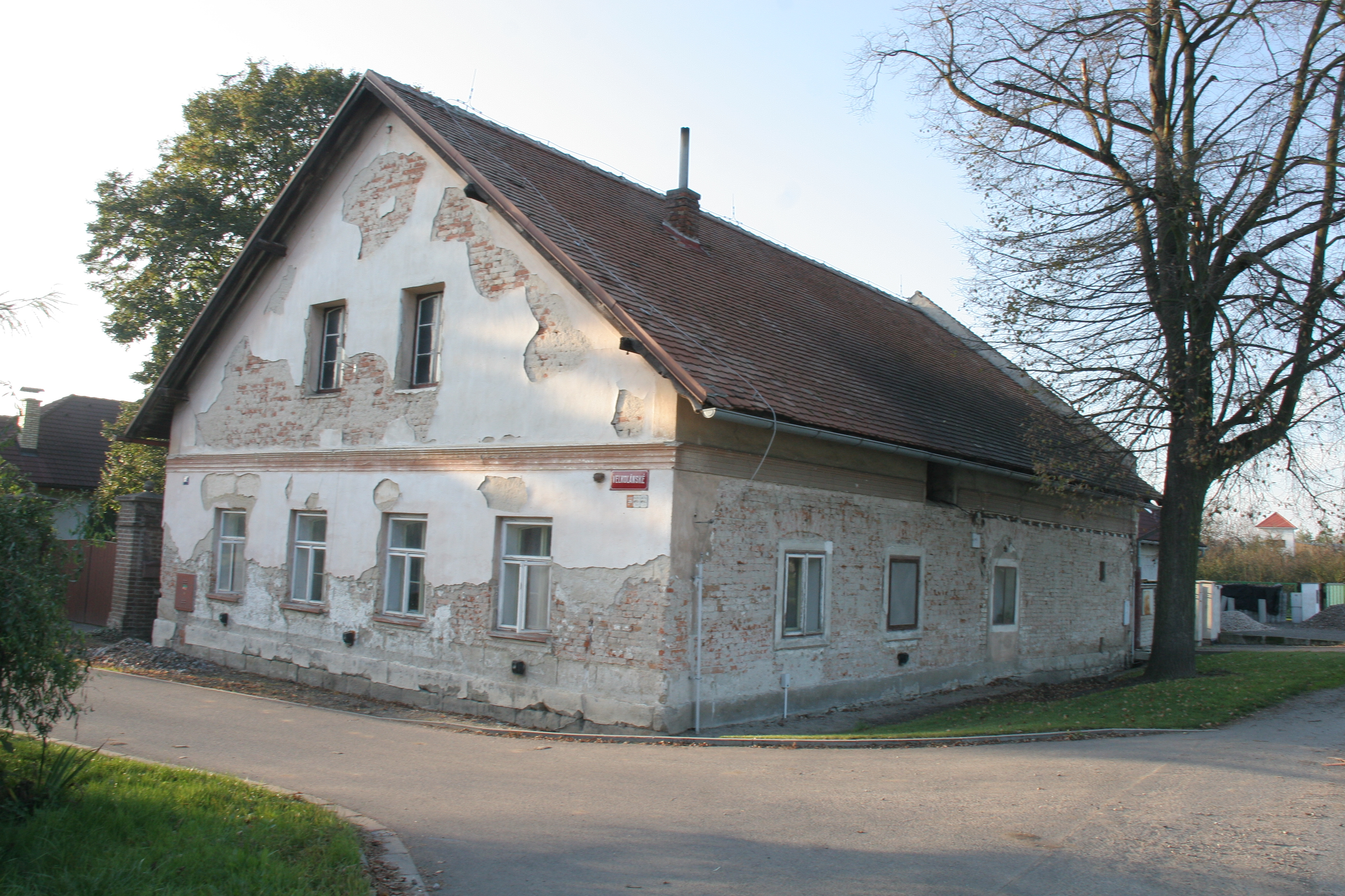 Velkolánské č. 9